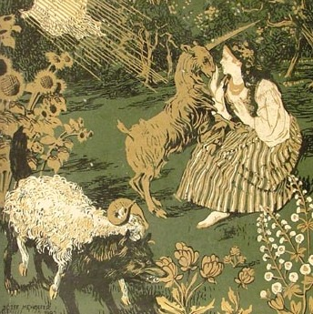 Okładka albumu "Sztuka polska - Malarstwo"